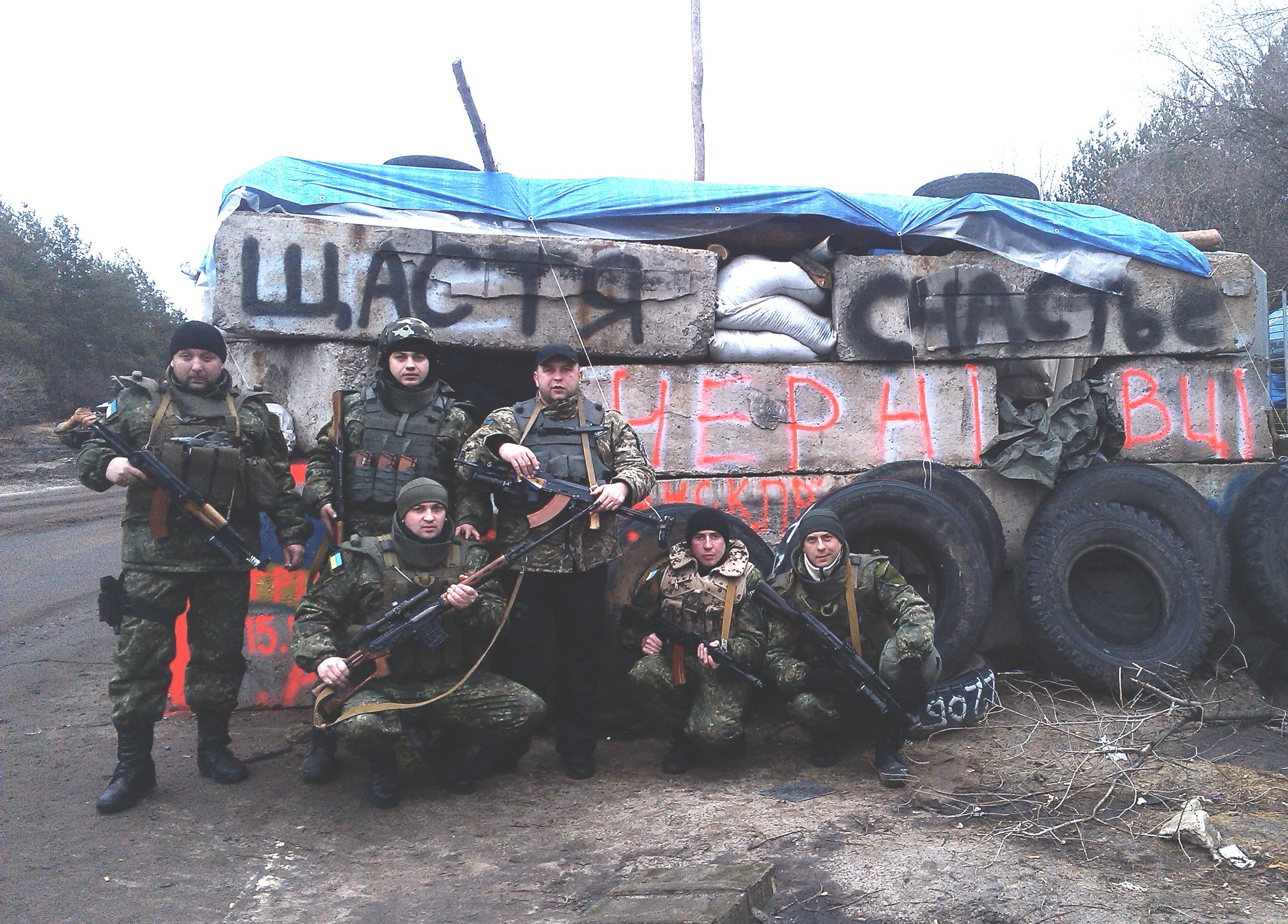 блок-пост в м.щастя співробітники спеціального підрозділу Грифон під час бойових дій на Сході деражави